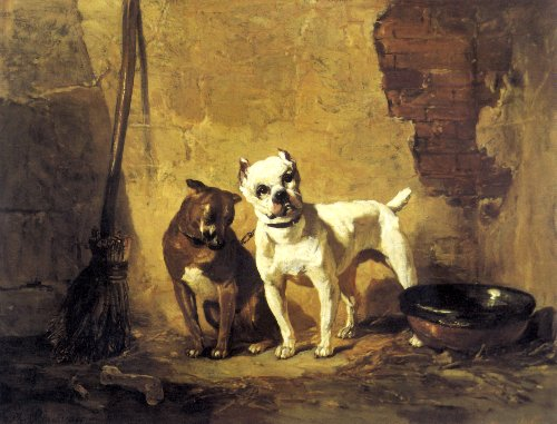 Best Of Friends - Bulldog & Bull Terrier